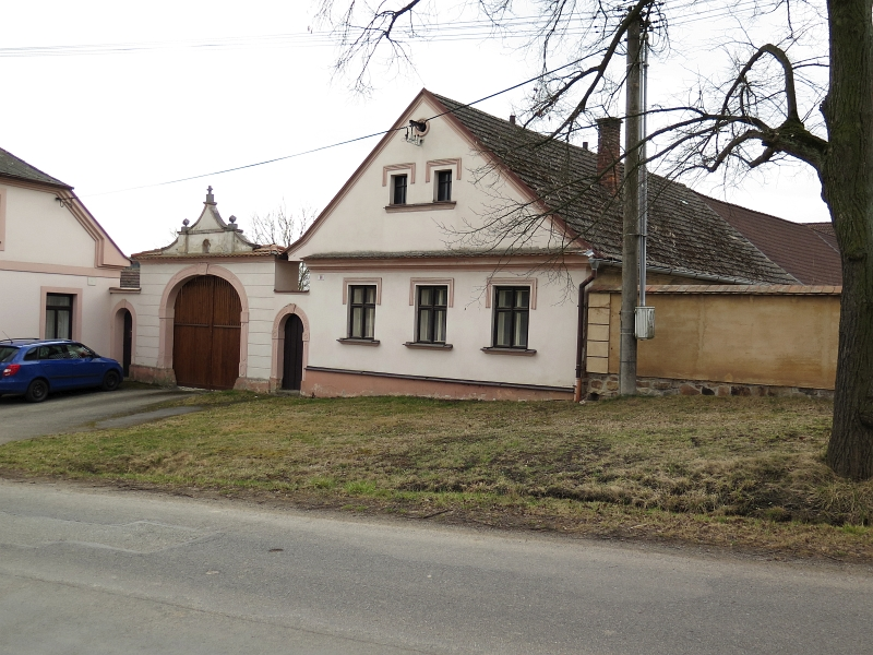 Usedlost čp. 58, Tymákov 58, Tymákov.